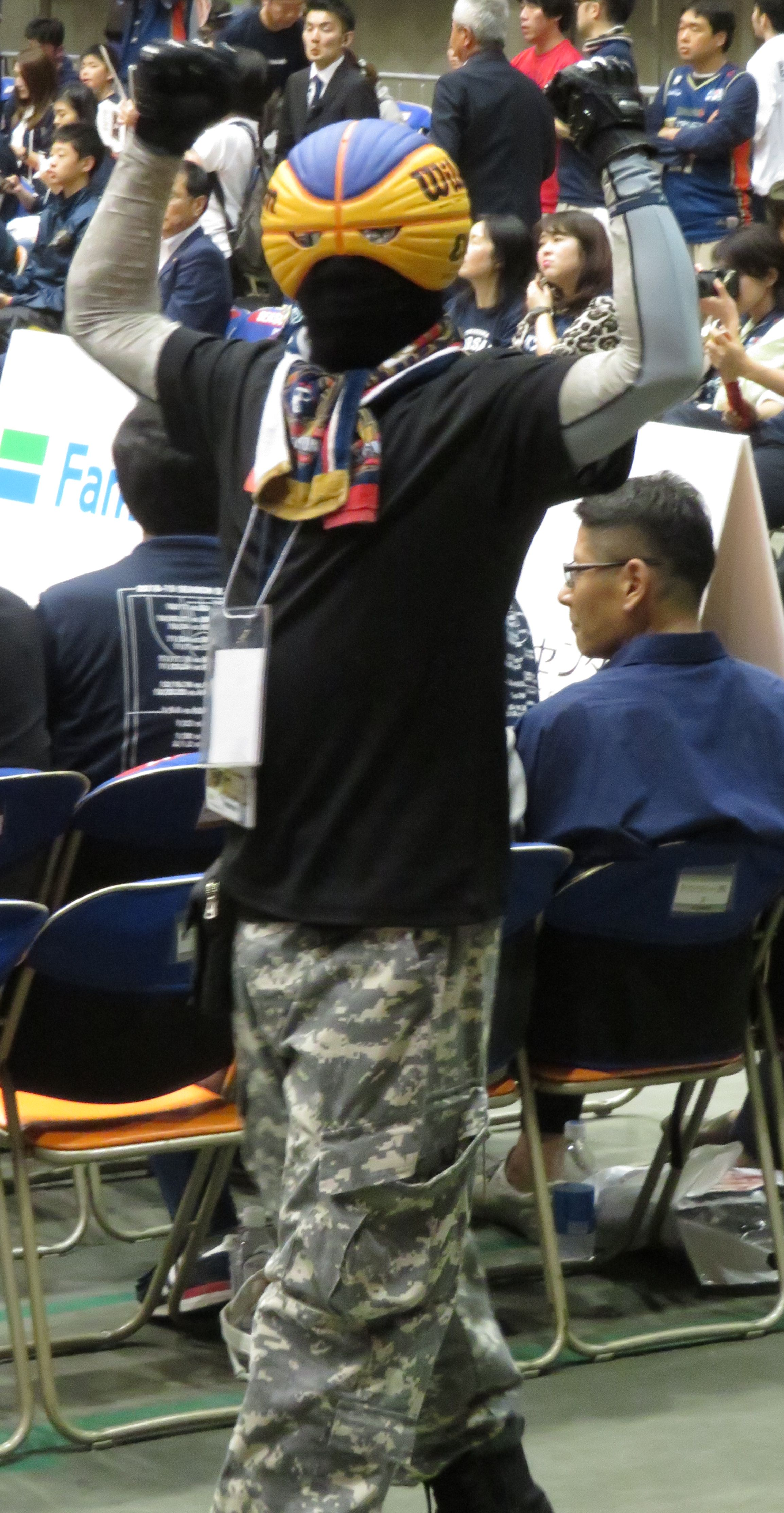 2018年10月18日撮影 2018-19 B1 第3節 横浜-富山 横浜文化体育館